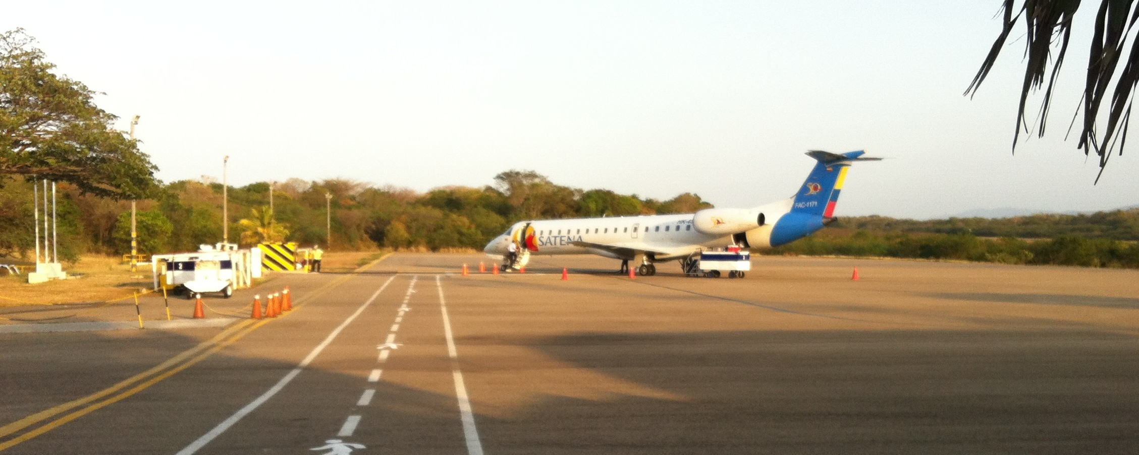 La Mina